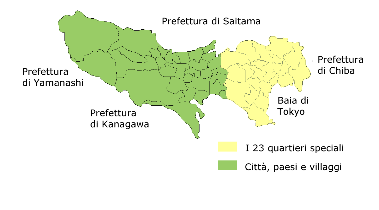 Mappa della prefettura di Tokyo (Giappone)